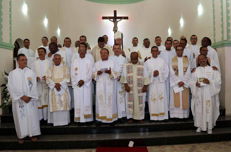 Clero Diocesano, presente na Ordenação Diaconal de Clayton e Tiago em Ipiaú-Bahia no dia 01 de novembro de 2015